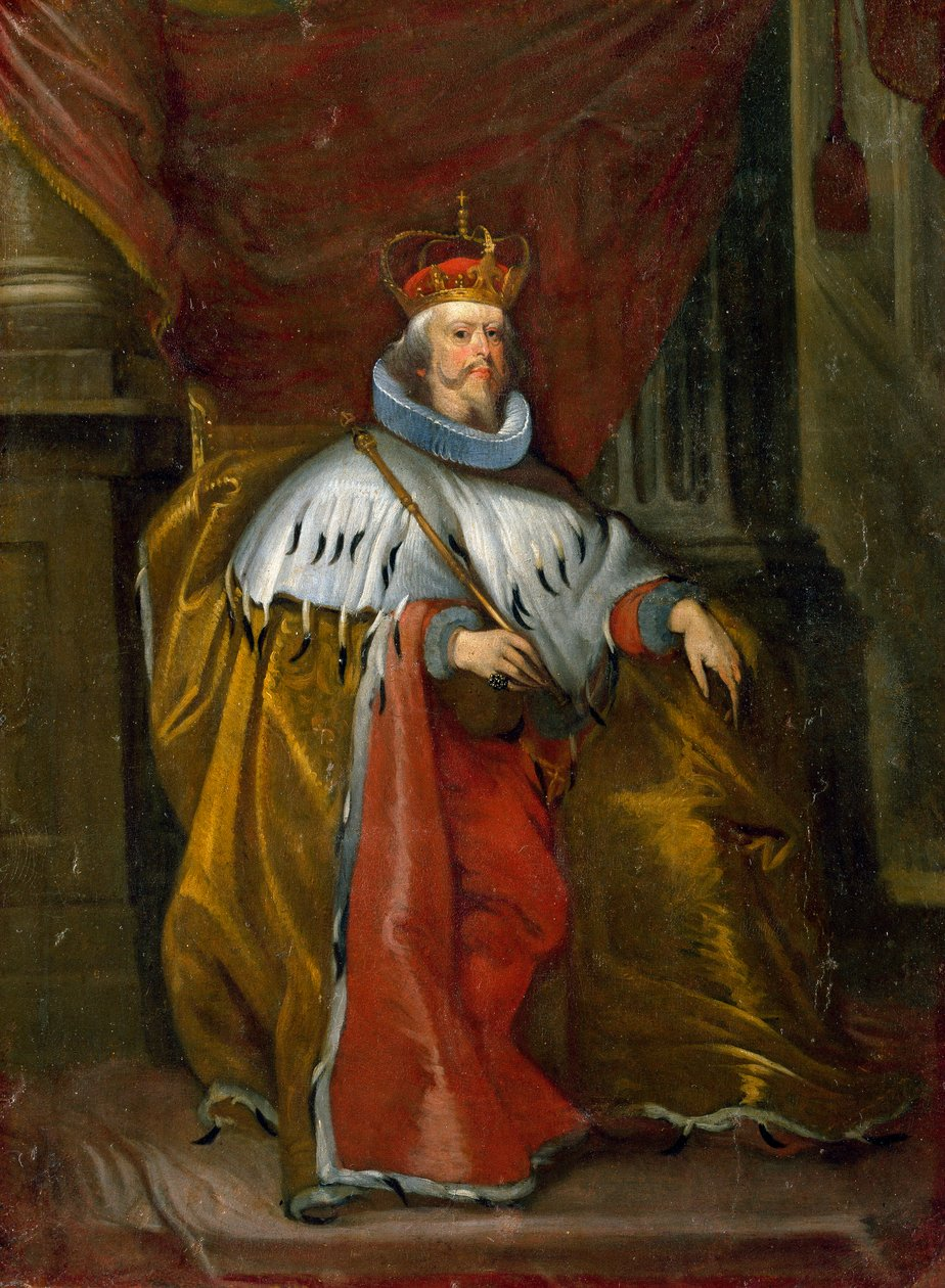 Il doge Luca Giustiniani (1644-1646)